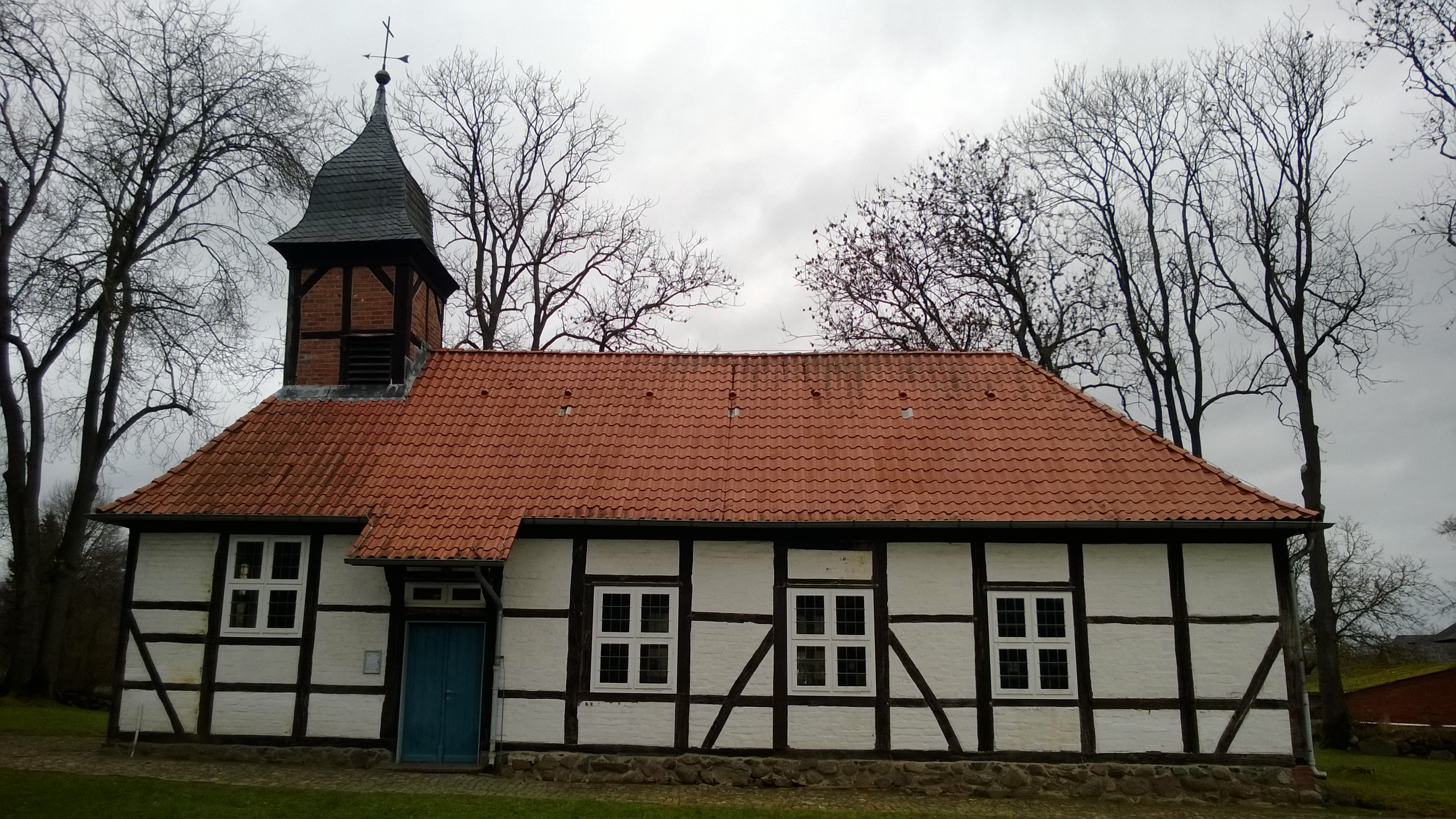 Fachwerkkapelle in Wietzetze (Lüchow-Dannenberg)